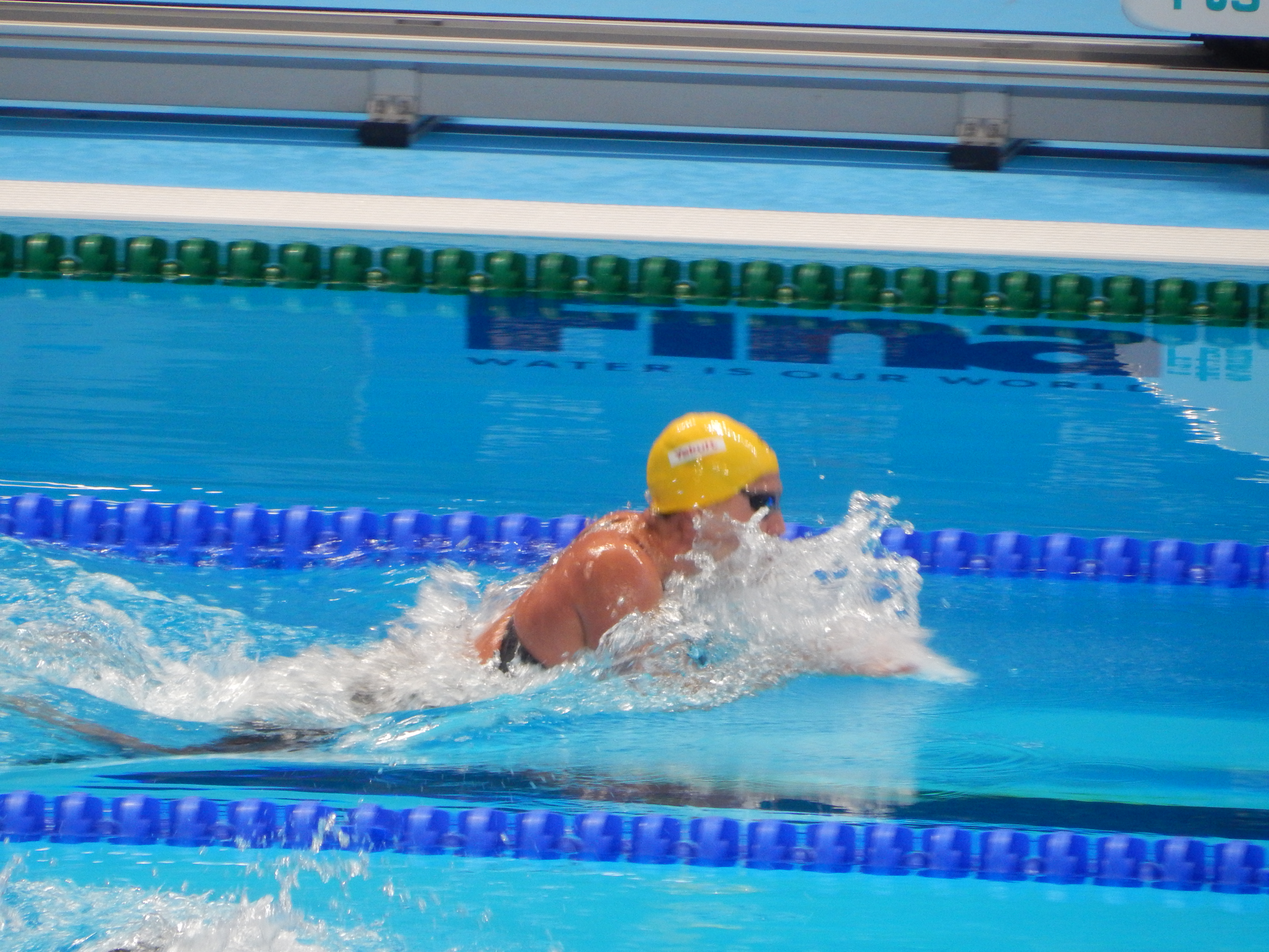 Лорна Тонкс в Казани на чемпионате мира